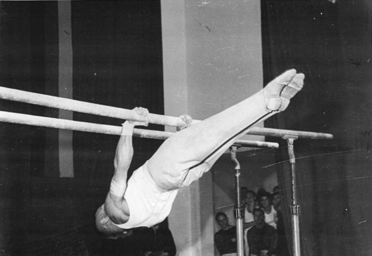 Alfred Müller Illus Th.B.D. 24.10.50 Die Meisterschaften der Deutschen Demokratischen Republik im Geräteturnen fanden am 21. und 22.10.50 in der Sportschule Greiz in Thüringen statt. Der Nachwuchs zeigte hier besonders gute Leistungen. UBz: Altmeister Alfred Müller von der BSG Leuna errang eine Einzelmeisterschaft am Barren mit 19,45 Punkten.